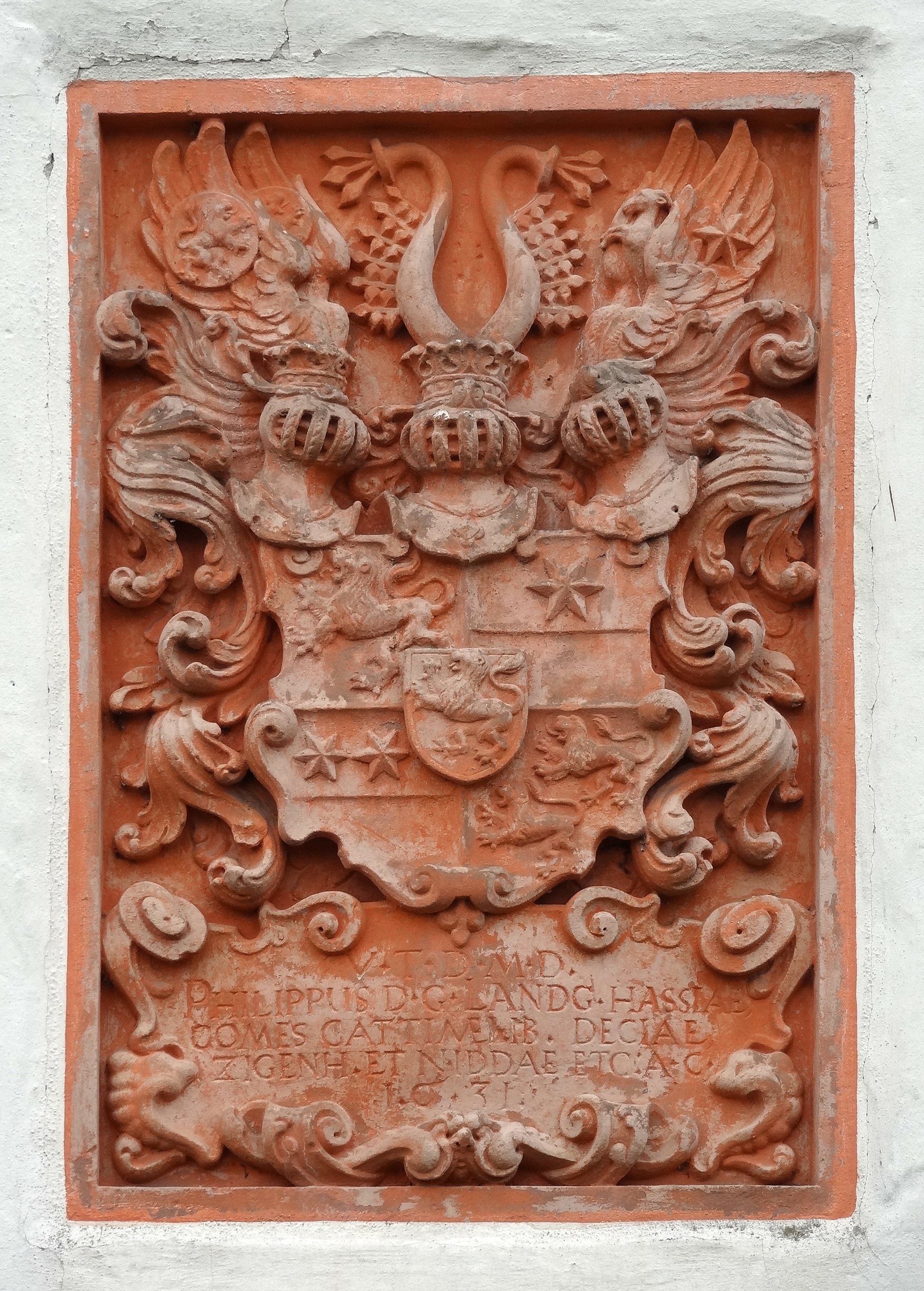 Evangelische Kirche Holzheim